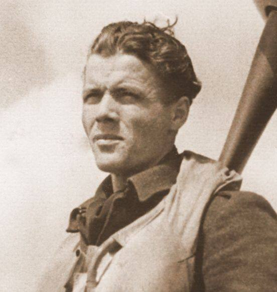 Na fotce Arnošt Mrtvý